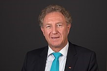 Bild Barthle